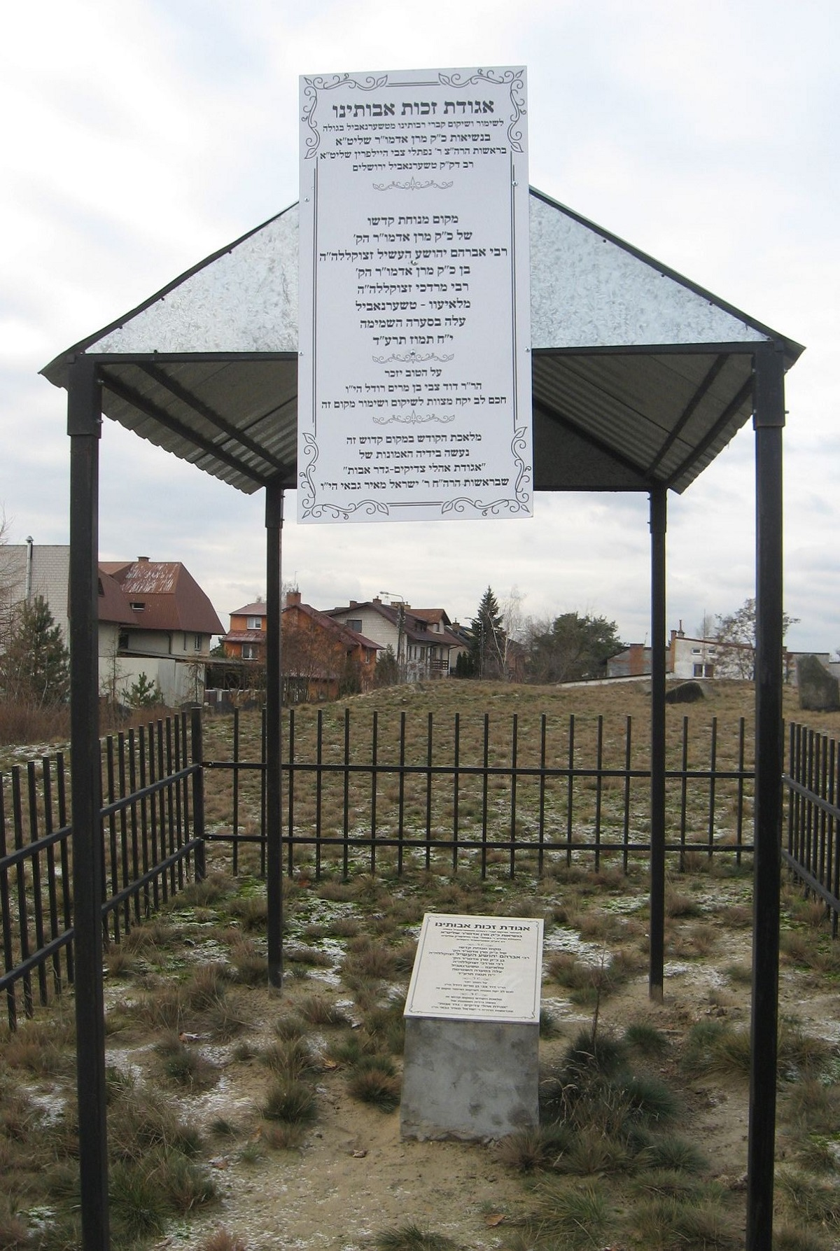 הקבר המשוקם - קורטשוב